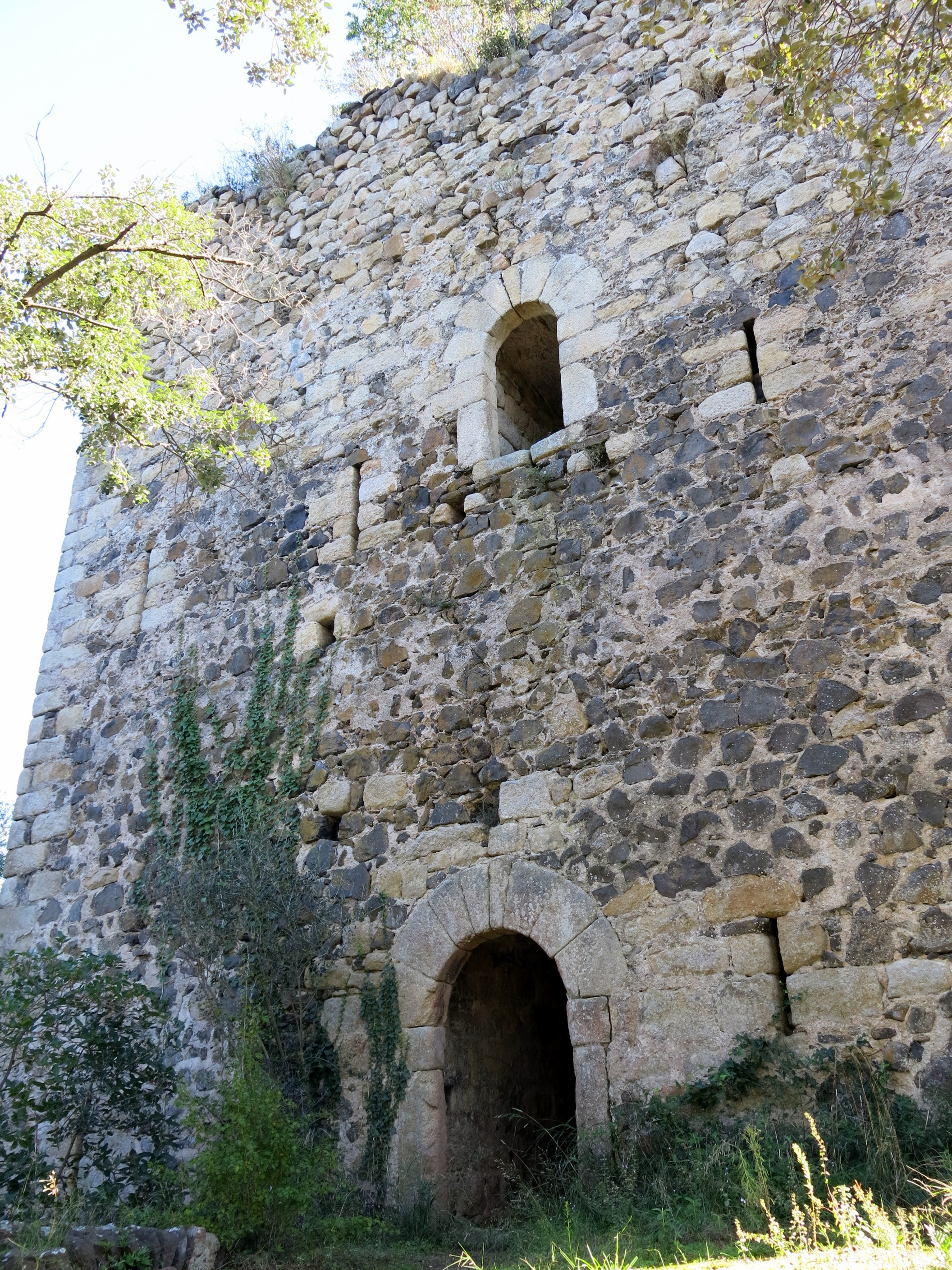 Torre de l'Esparra a Riudarenes, comarca de la Selva - Catalunya